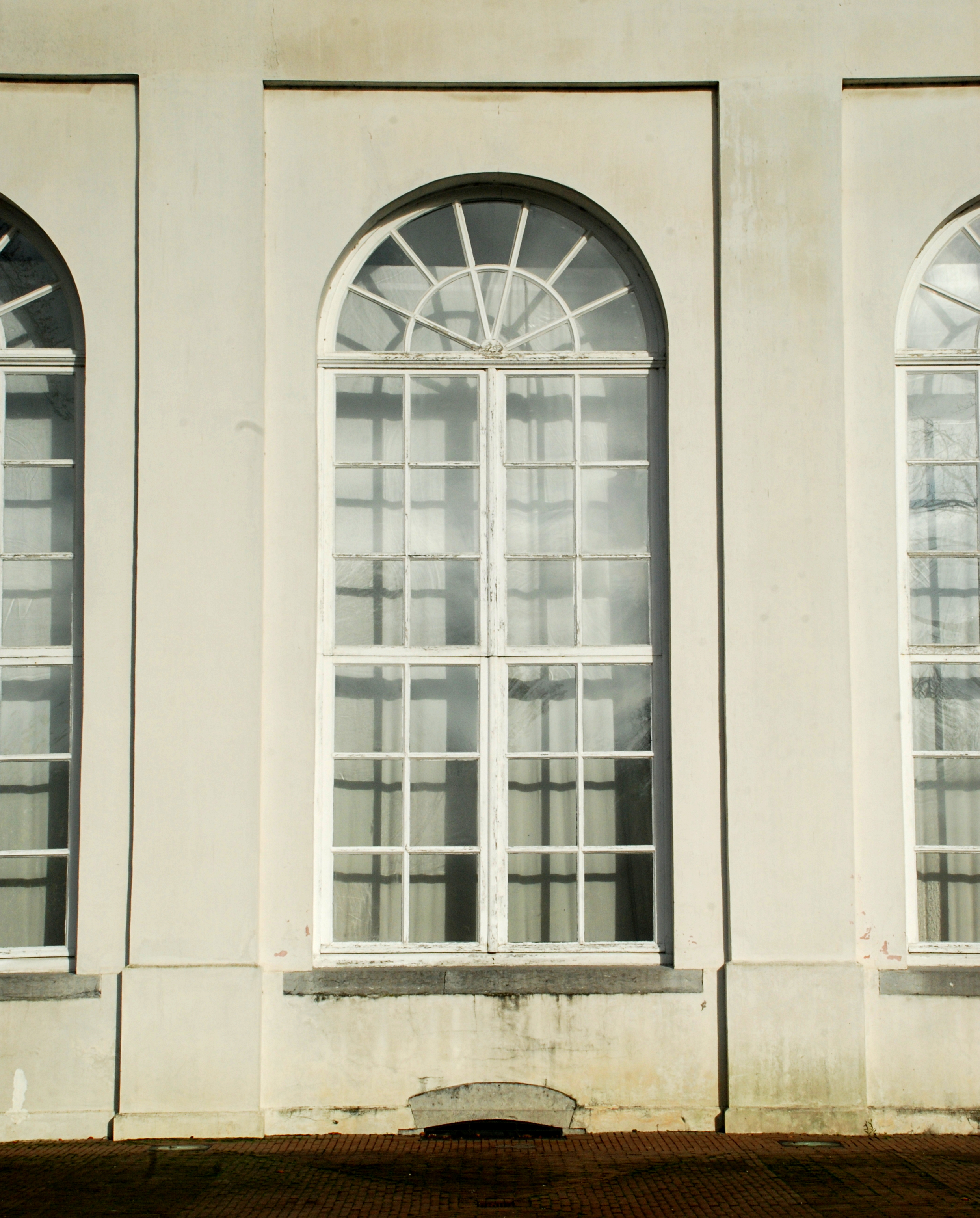 Belgique - Hainaut - Orangerie du château de Seneffe